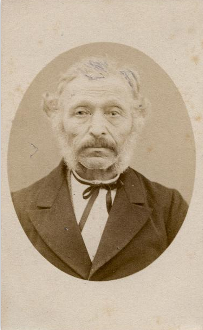 Israël David Kiek (Groningen, 22 april 1811 - Leiden, 14 mei 1899) was een Nederlands fotopionier. Zijn achternaam is in Nederland synoniem geworden voor de pretentieloze, uit de losse pols geschoten, foto: het kiekje.